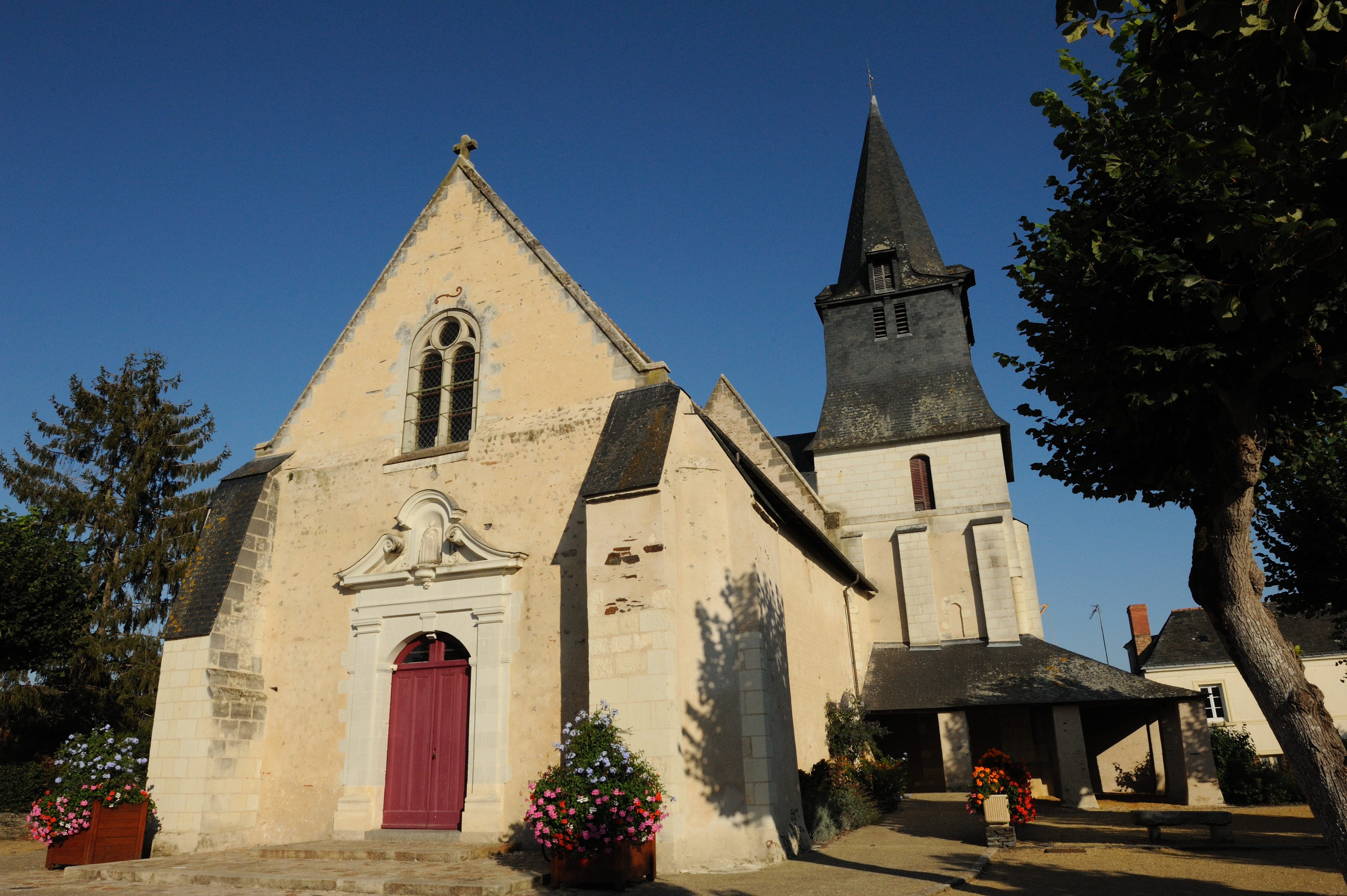 Vue générale .